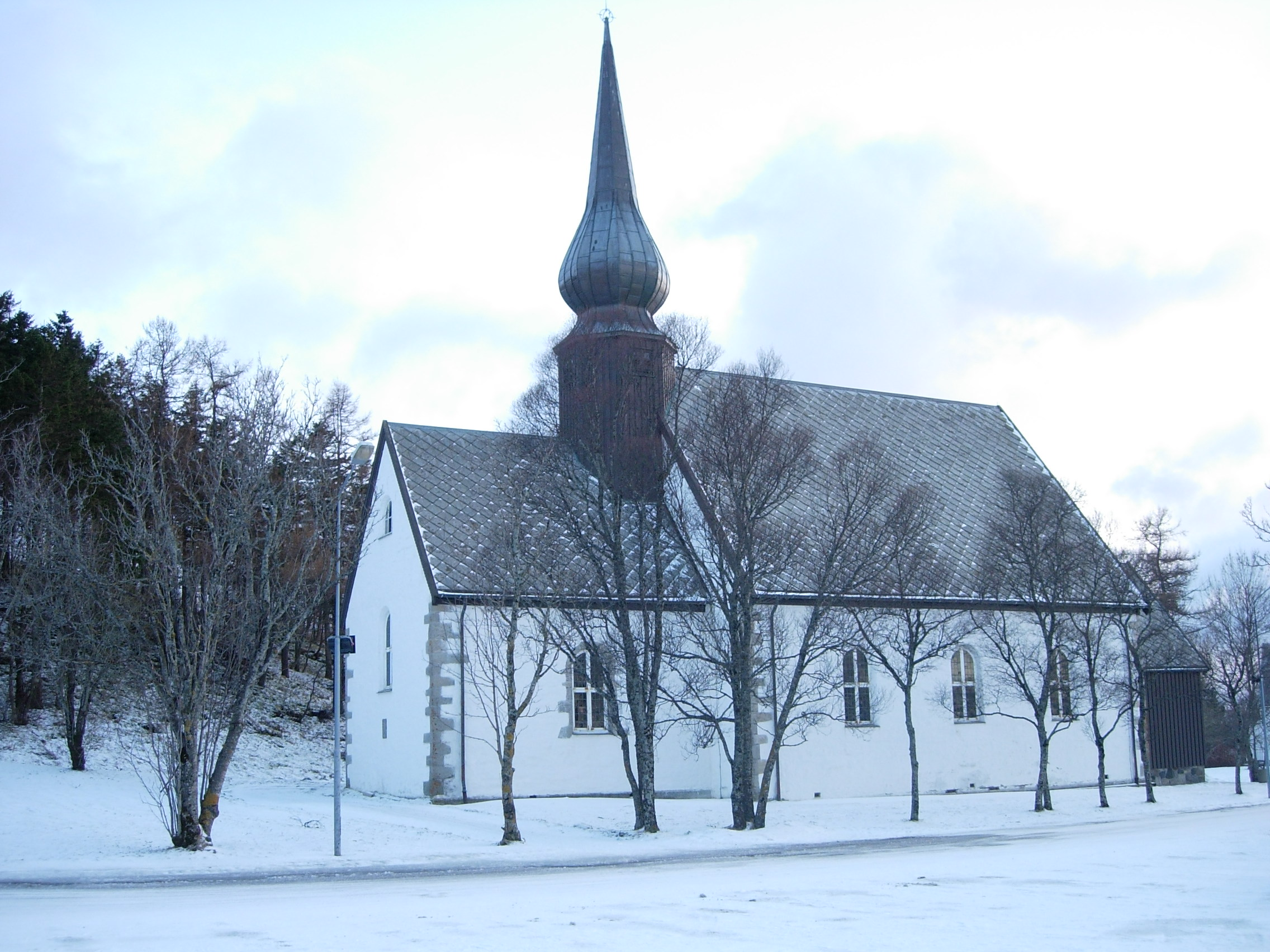 Bodin church, side